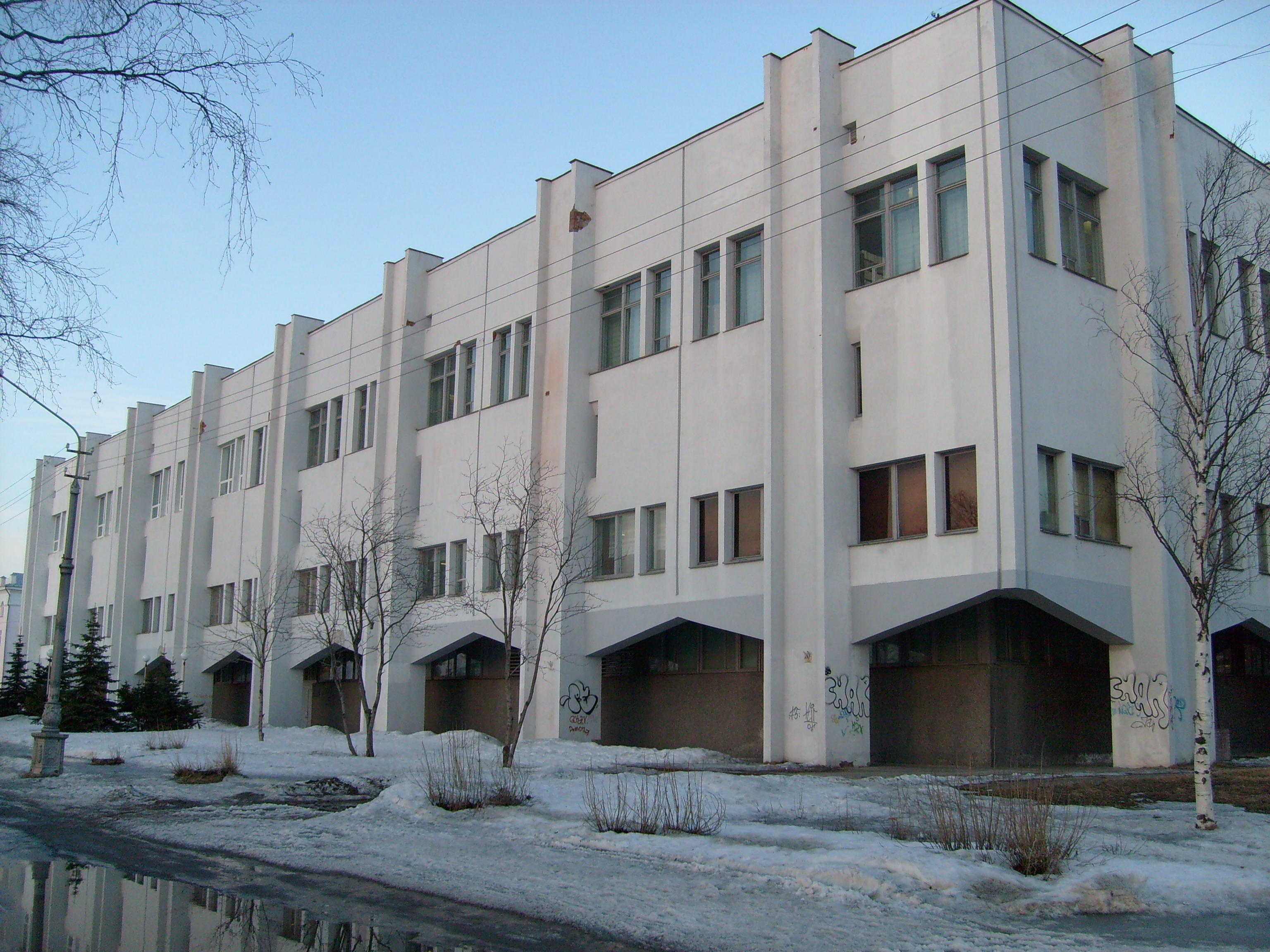 Архангельская ордена Знак Почета областная научная библиотека имени Н. А. Добролюбова